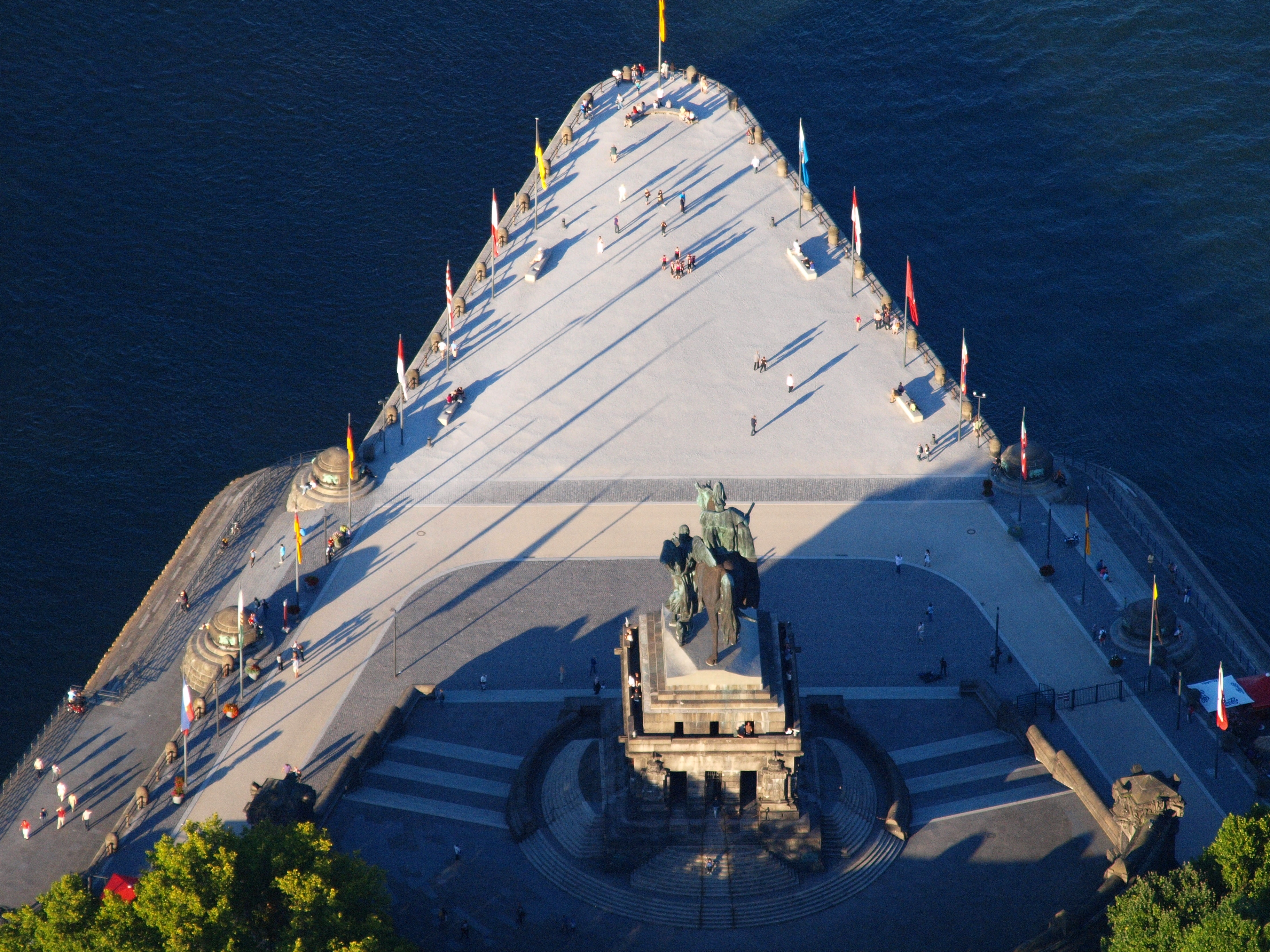 Deutsches Eck, Koblenz: Luftaufnahme